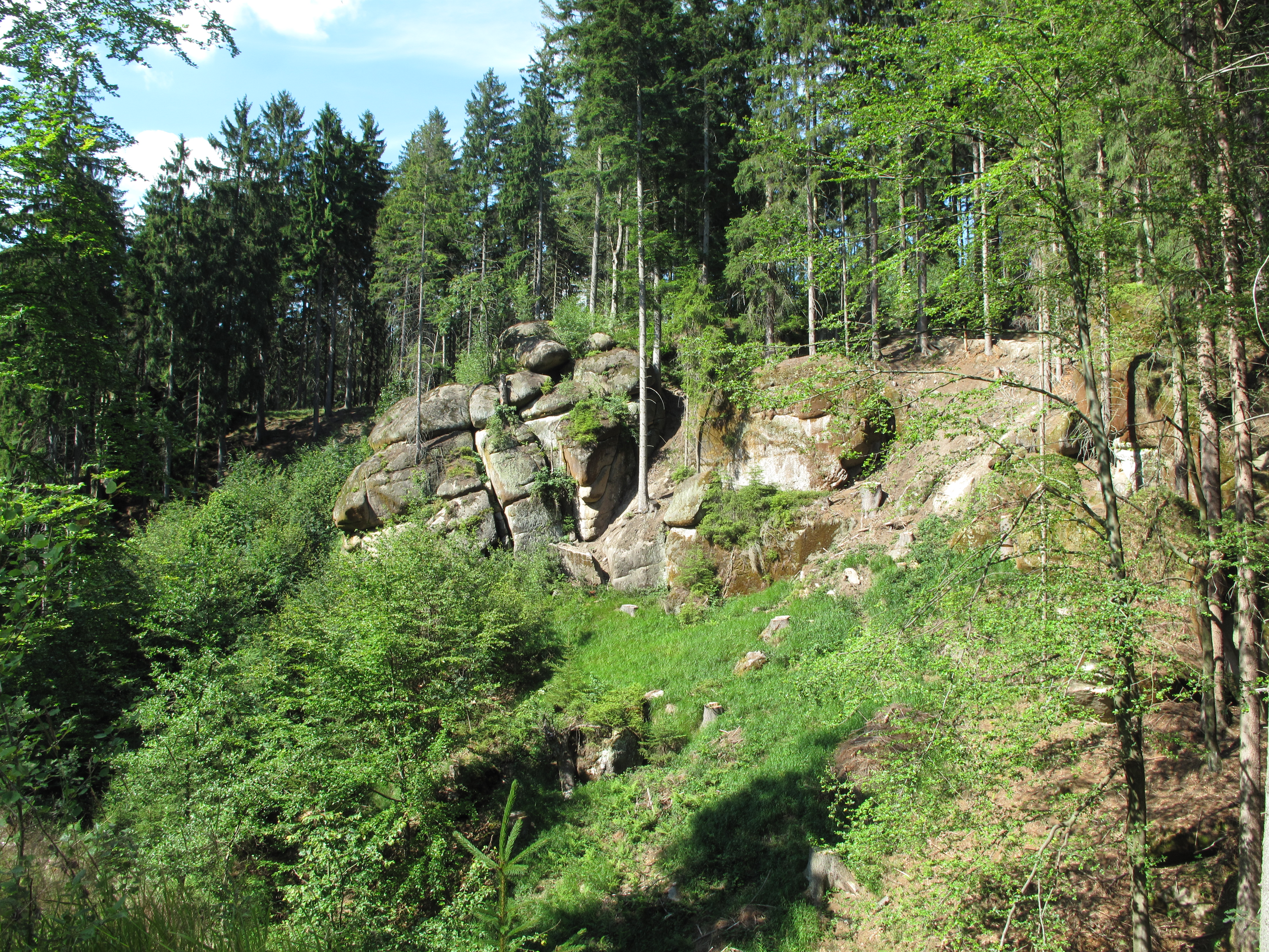 Polické stěny